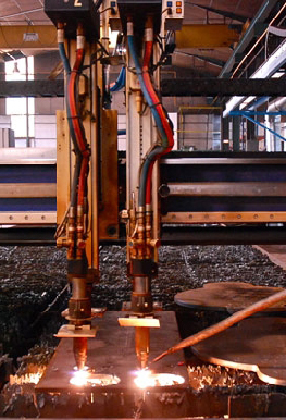 Vue de détail sur une machine d'oxycoupage à deux têtes